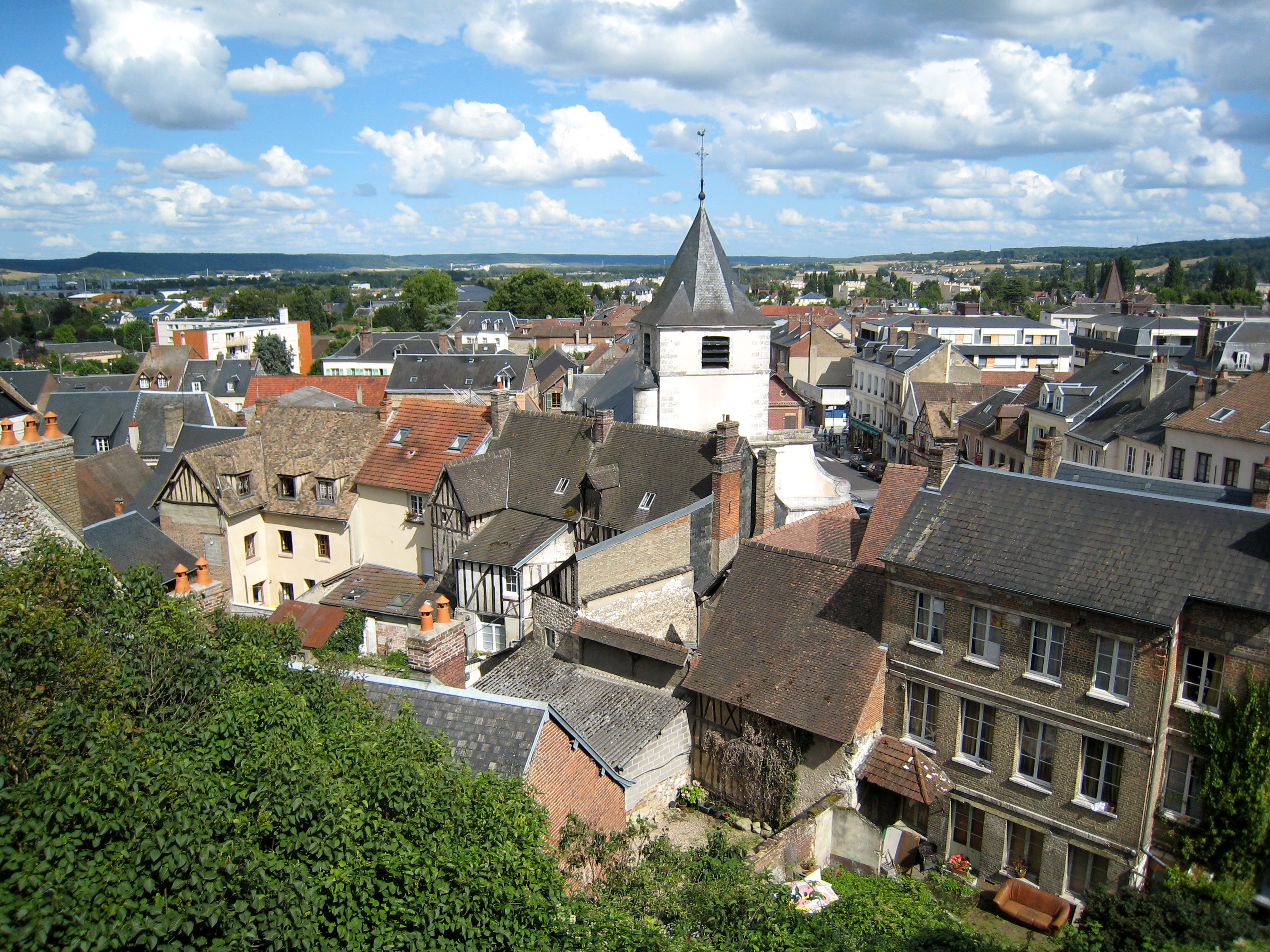 La ville de Gaillon vue du château